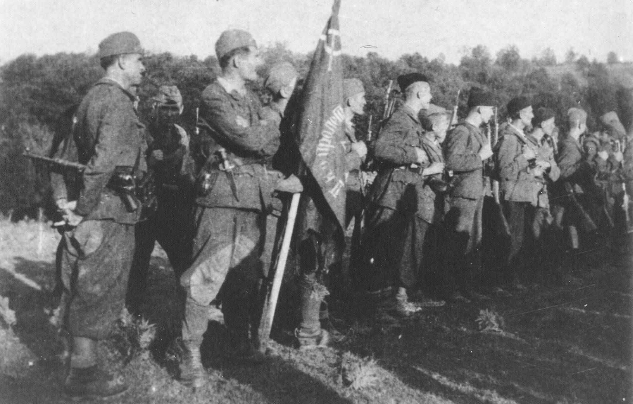 Partigiani della Seconda brigata proletaria nel luglio 1943